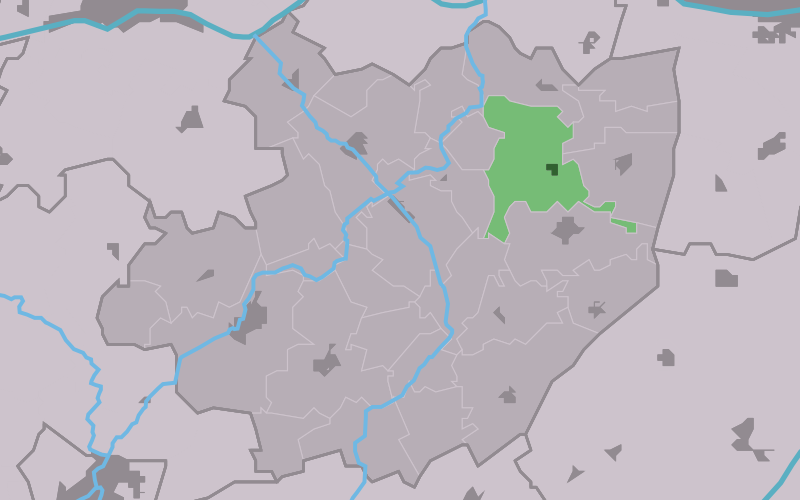 Kaartsje fan himrik fan Jorwert